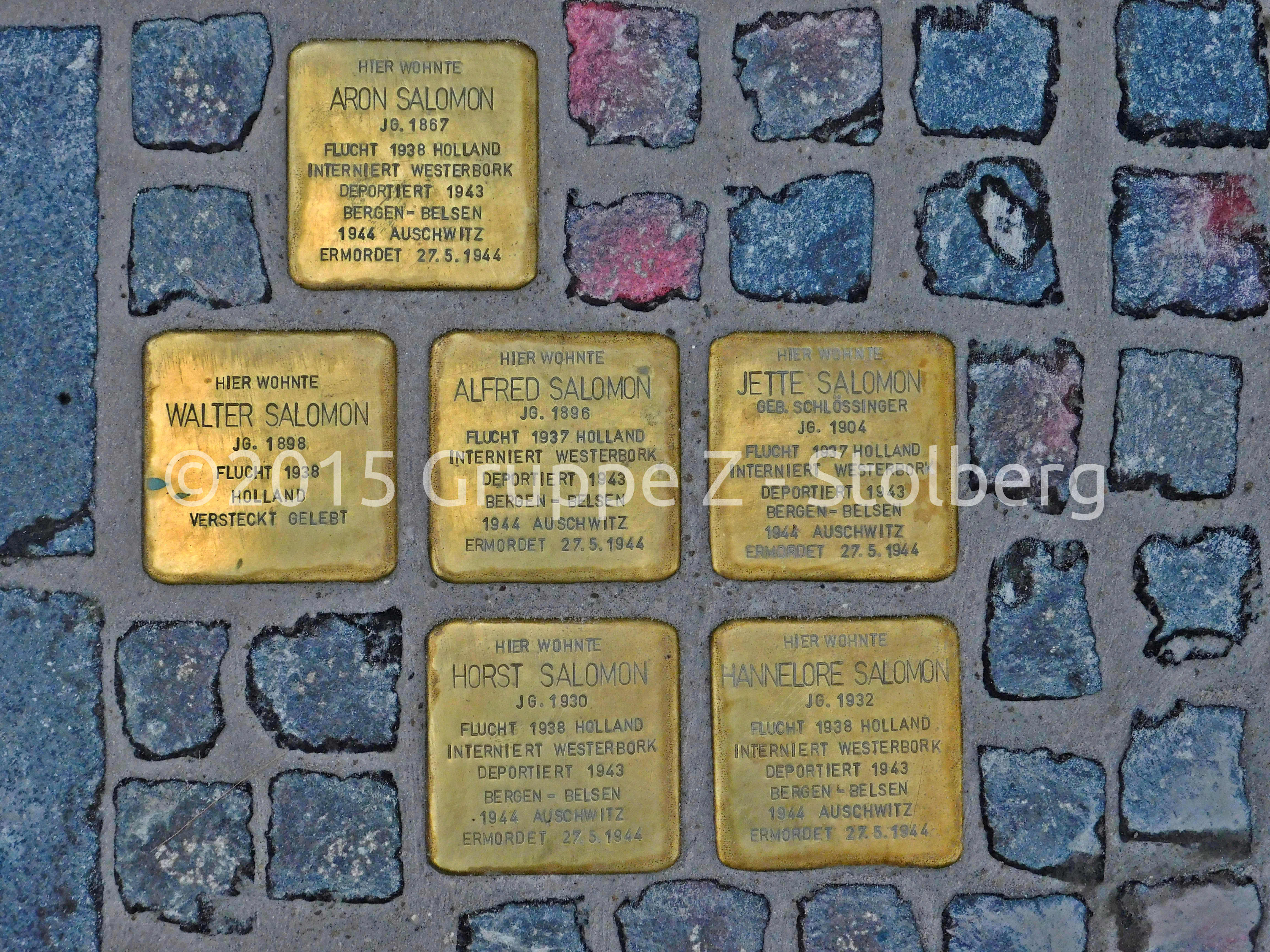 Stolpersteine für Familie Salomon verlegt am 18. Dezember 2015